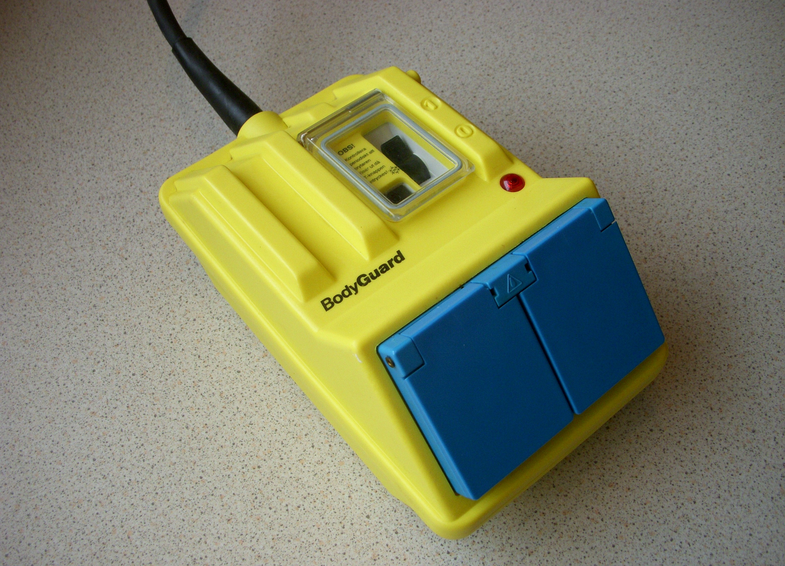 Jordfelsbrytare modell BodyGuard, design: InterDesign